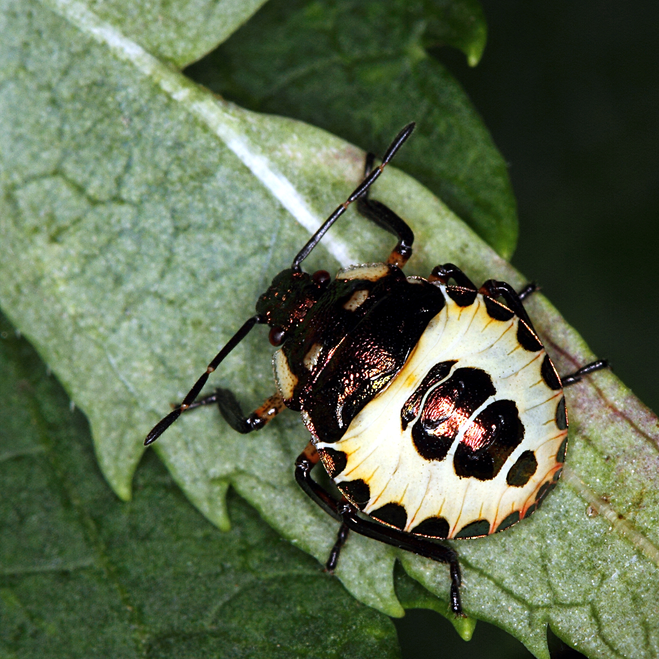 Sachsen, Waldrand: Nymphe_der_Spitzbauchwanze_(Troilus_luridus)